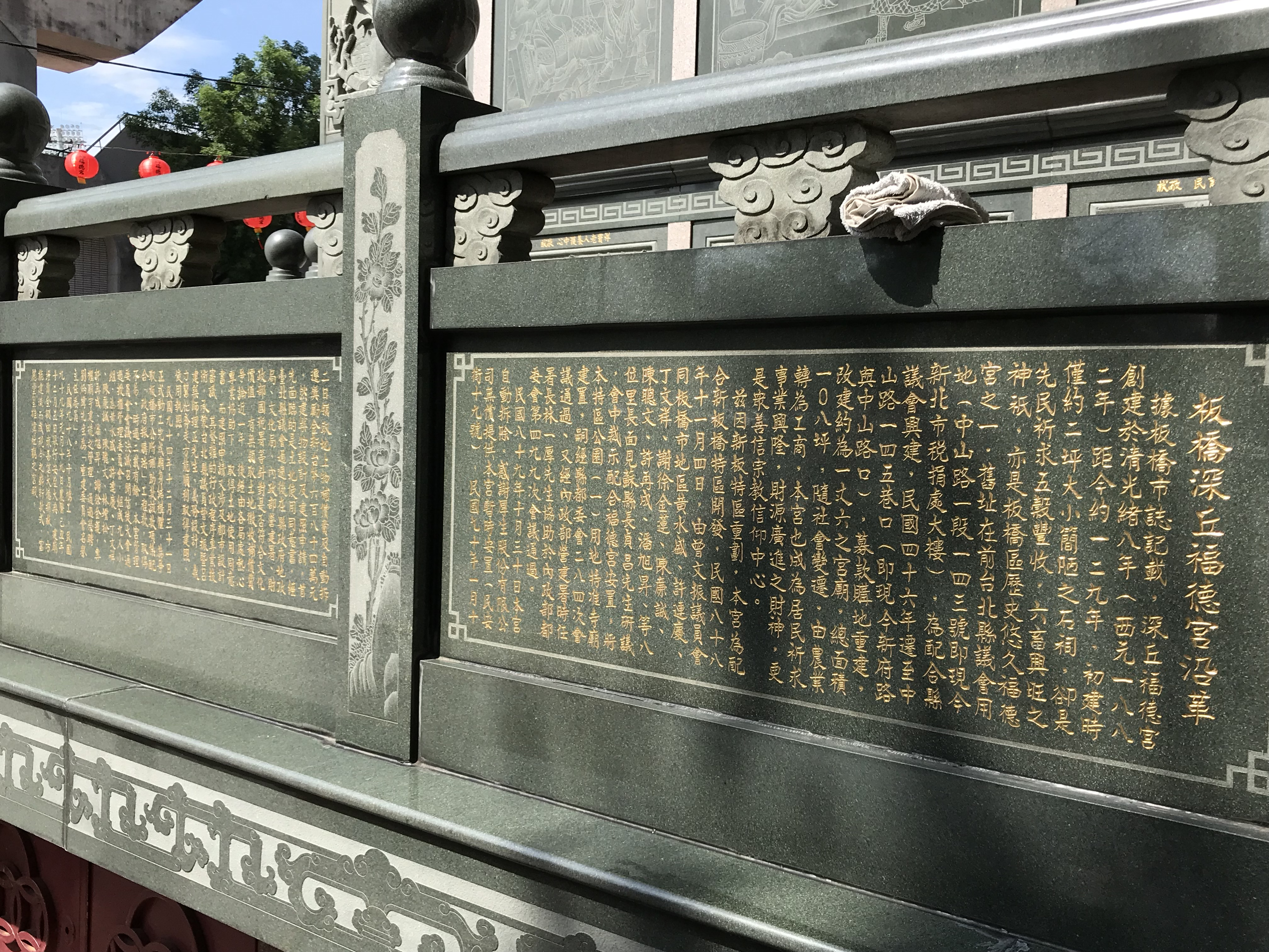 中文（台灣）: 深丘福德宮沿革